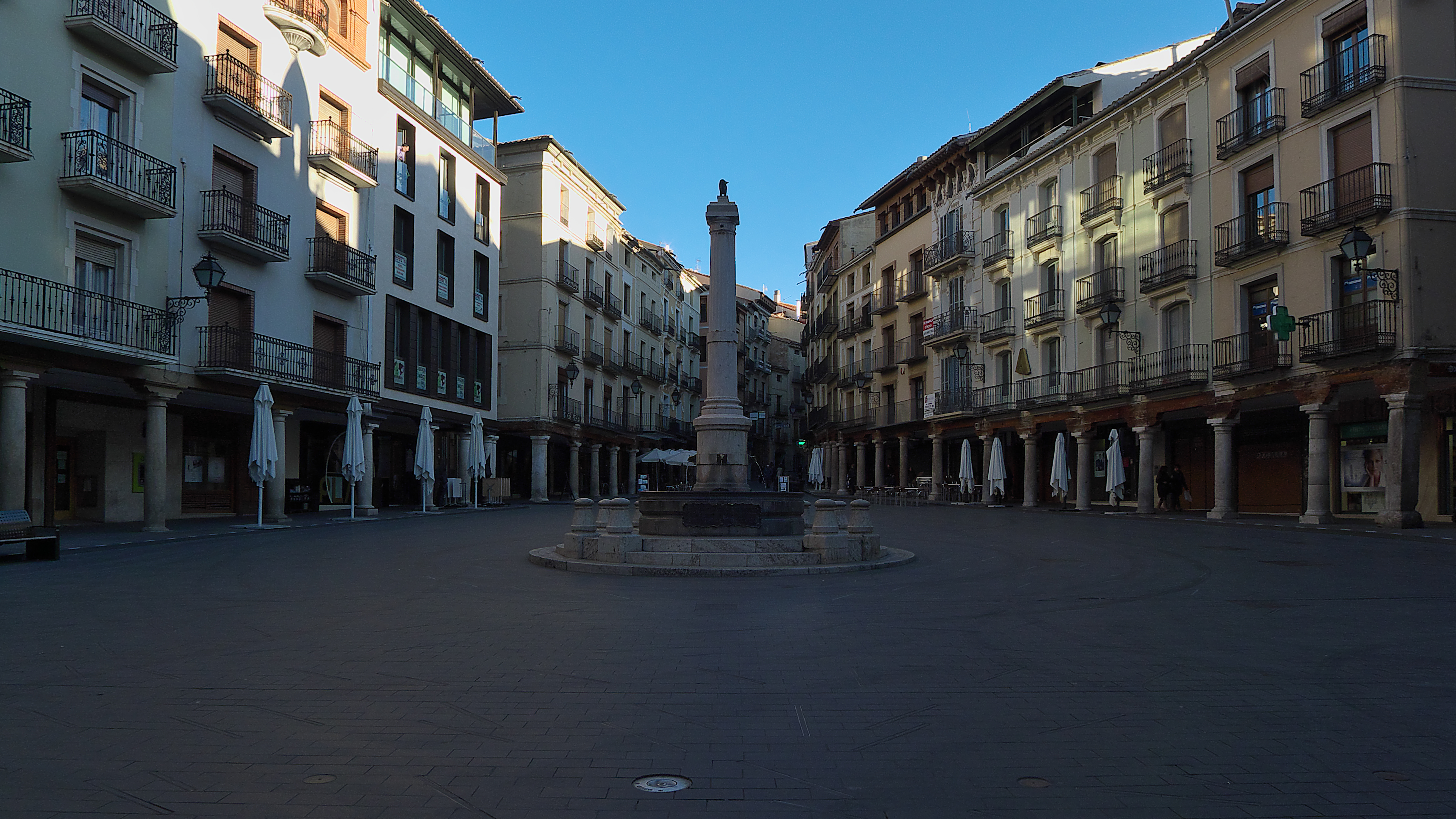 Plaza Mayor de la ciudad. La última reforma es del 2008.